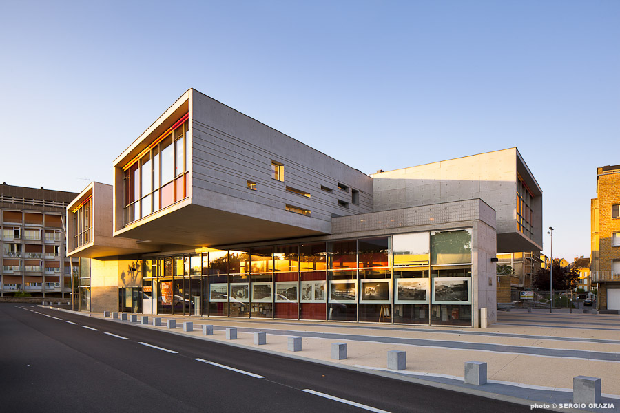 Pole culturel de Sedan - richard et schoeller architectes